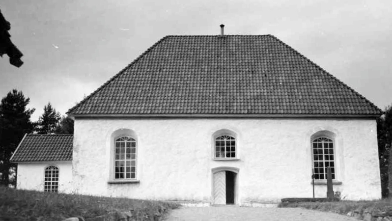 Tannåkers kyrka 1941